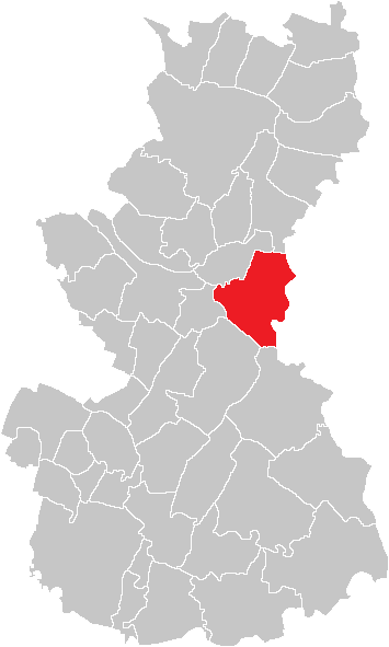 Bezirk Gänserndorf